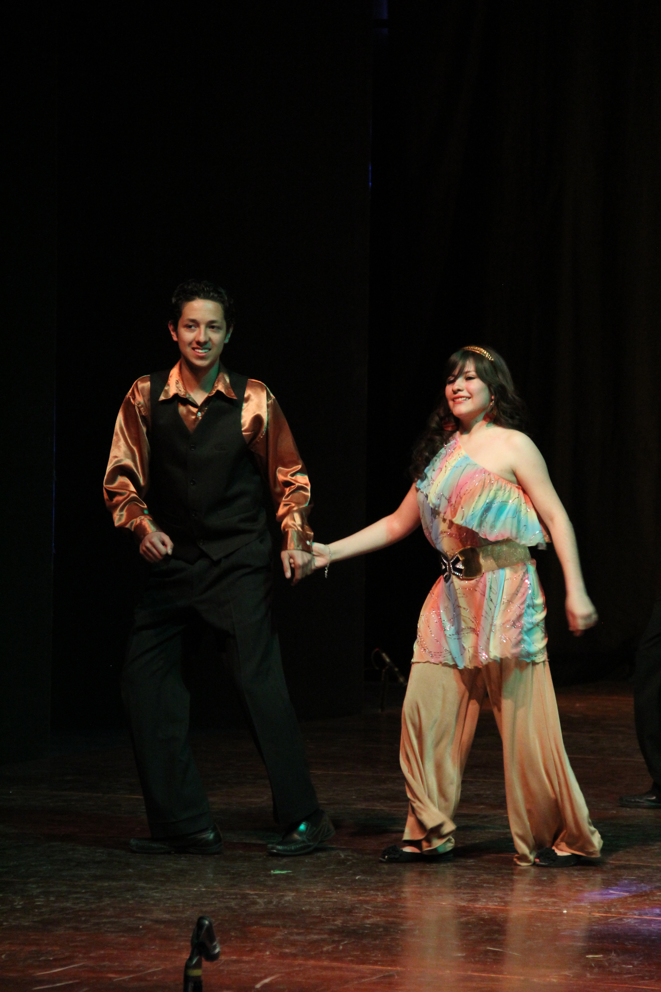 Baile disco durante el evento Semana de la Cultura en ITESM Campus Ciudad de México